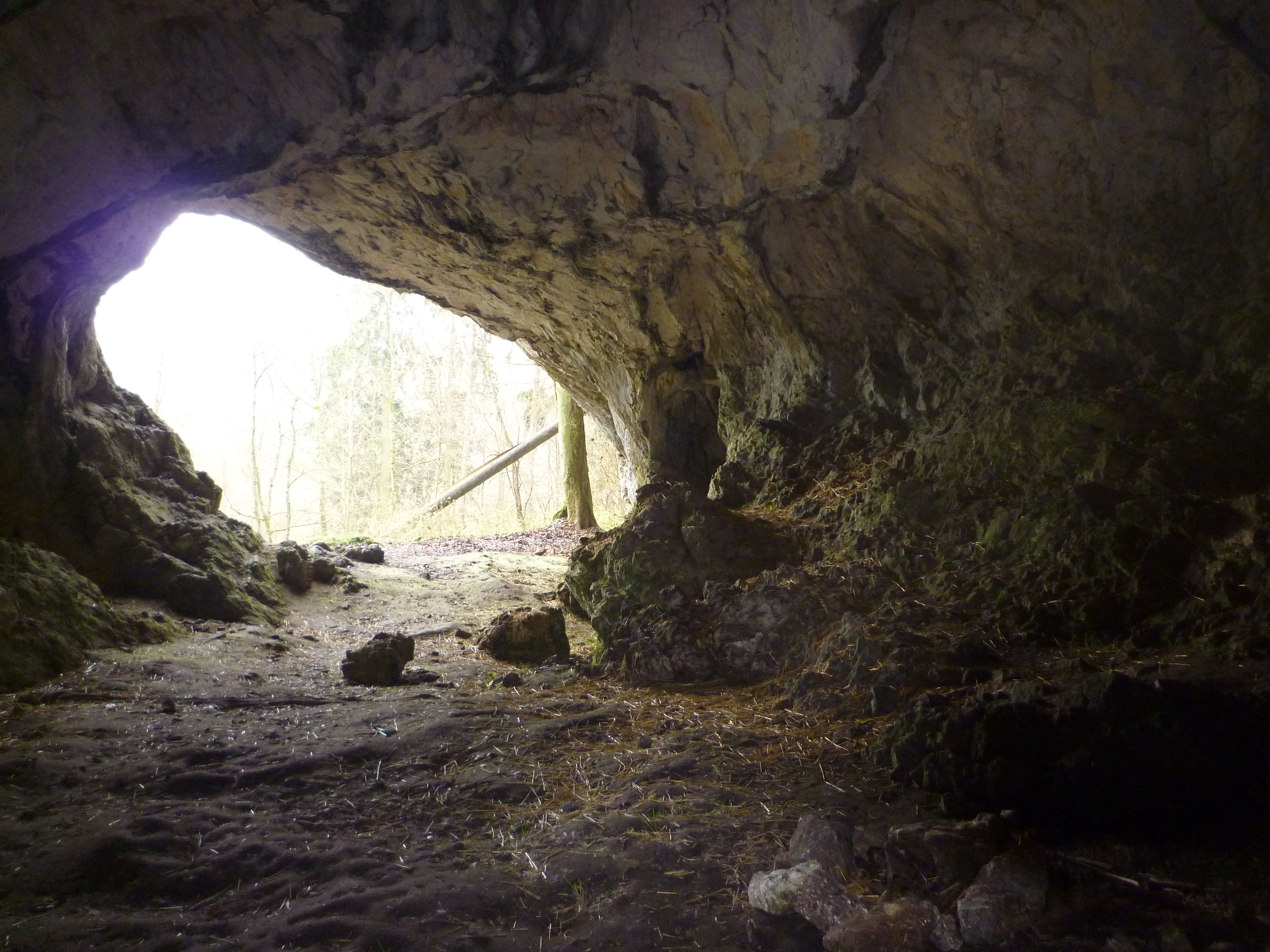 Lonetal Hohlenstein,Fundort des Löwenmenschen vor 33TSD Jahren02.jpg